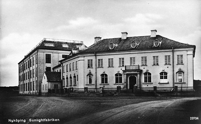 Sunlights fabriker i Nyköping på 30-talet.